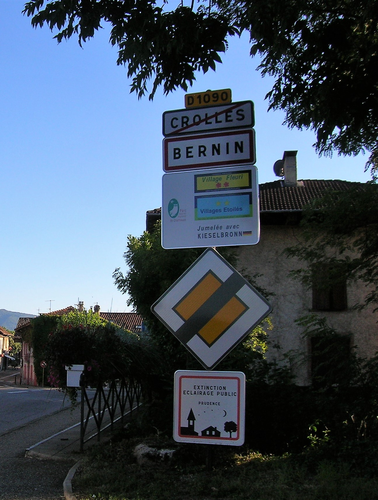 Bernin, Isère, AuRA, France.